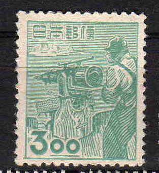 japanese stamp